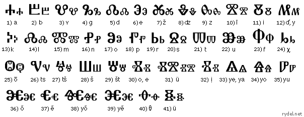 Беларуская (тарашкевіца): Глаголіца